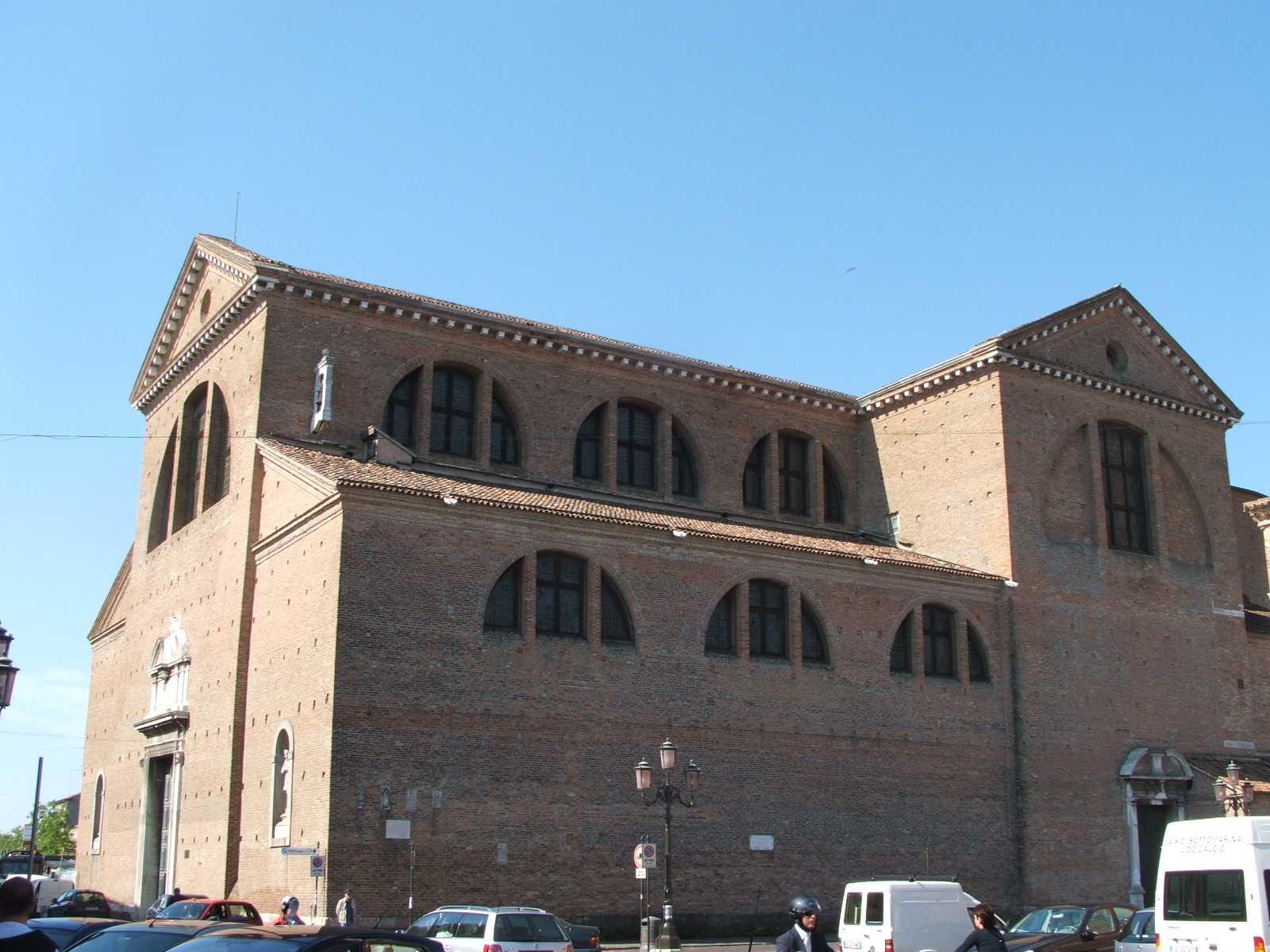 Chioggia, laguna veneta